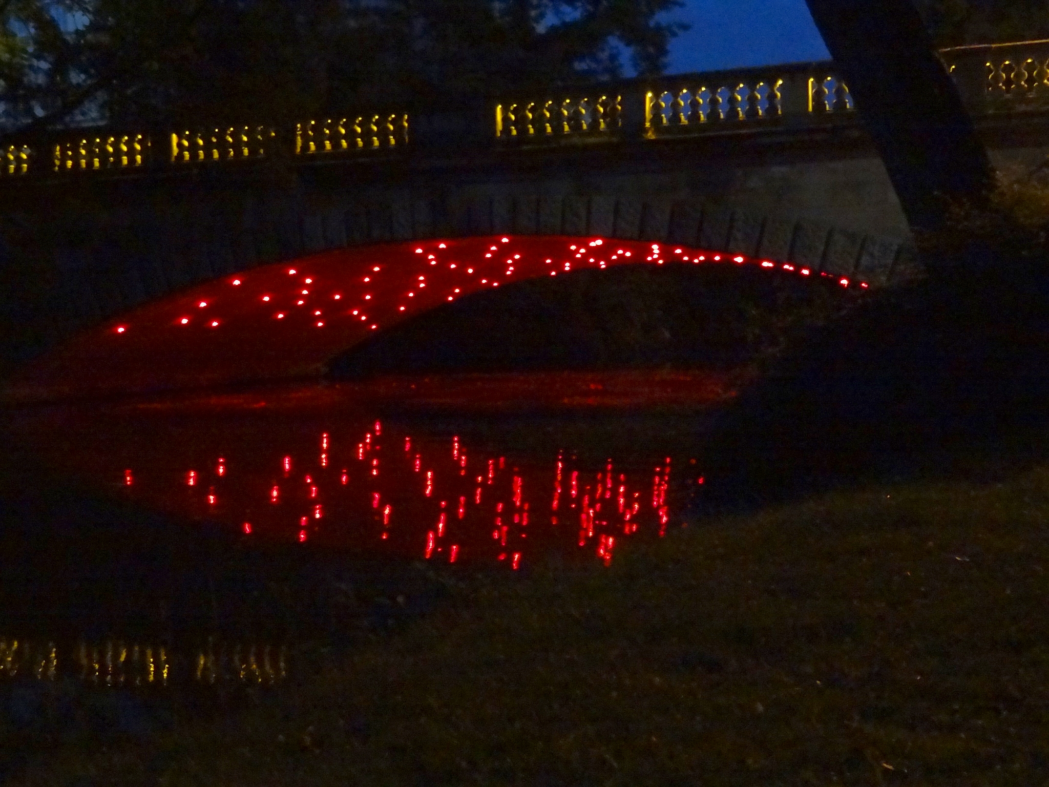 „Evokation in Rot“ wurde von der Hannoveranischen Künstlerin Yvonne Goulbier entworfen.